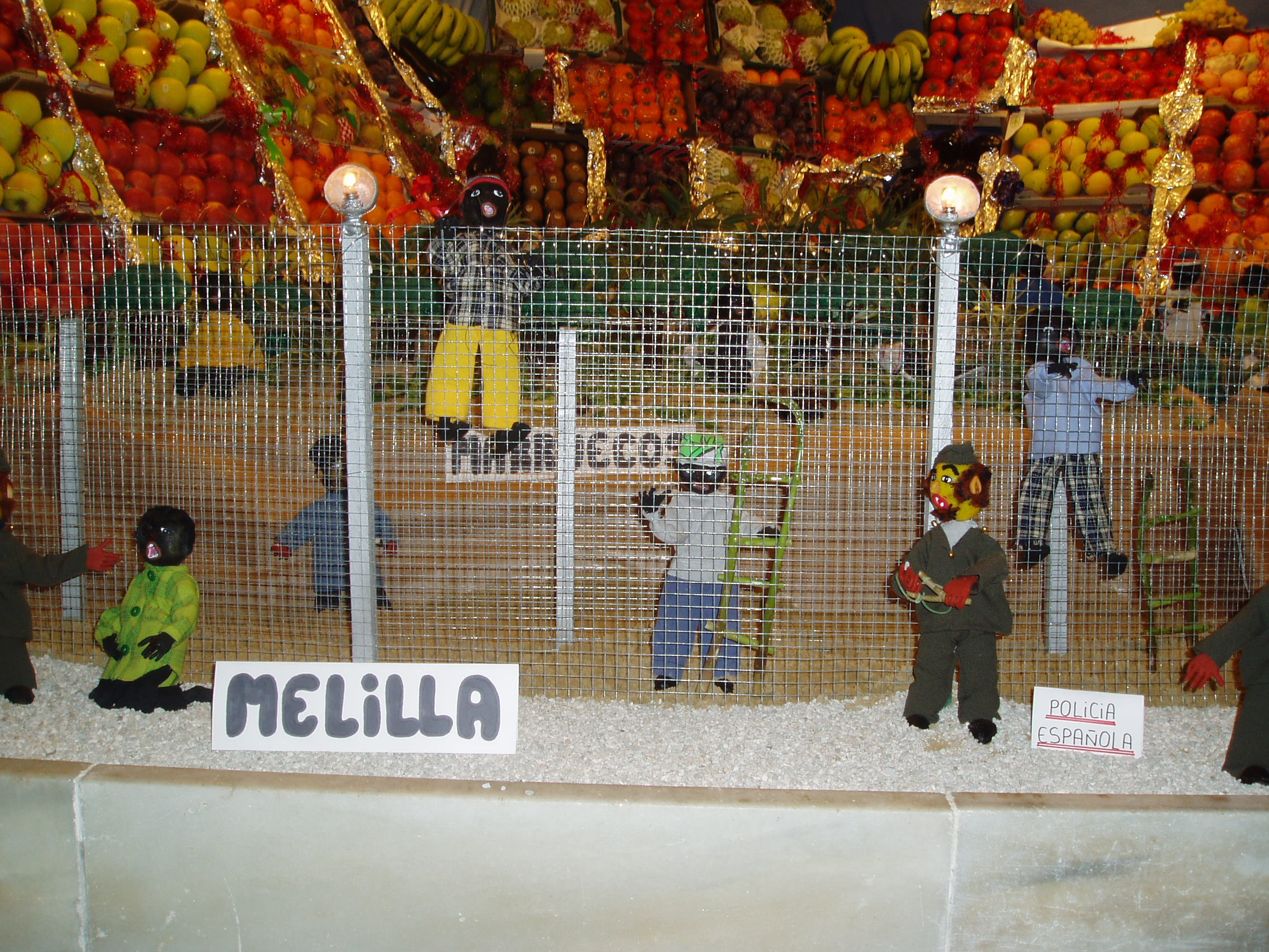 Tosantos en el mercado de Cádiz, España. Junto con el humor plasmado en las figuras hechas con verduras, frutas y diversos animales, también hay espacio para la crítica social. Representación de la crisis de las vallas de Ceuta y Melilla de 2005, frontera entre España y Marruecos.